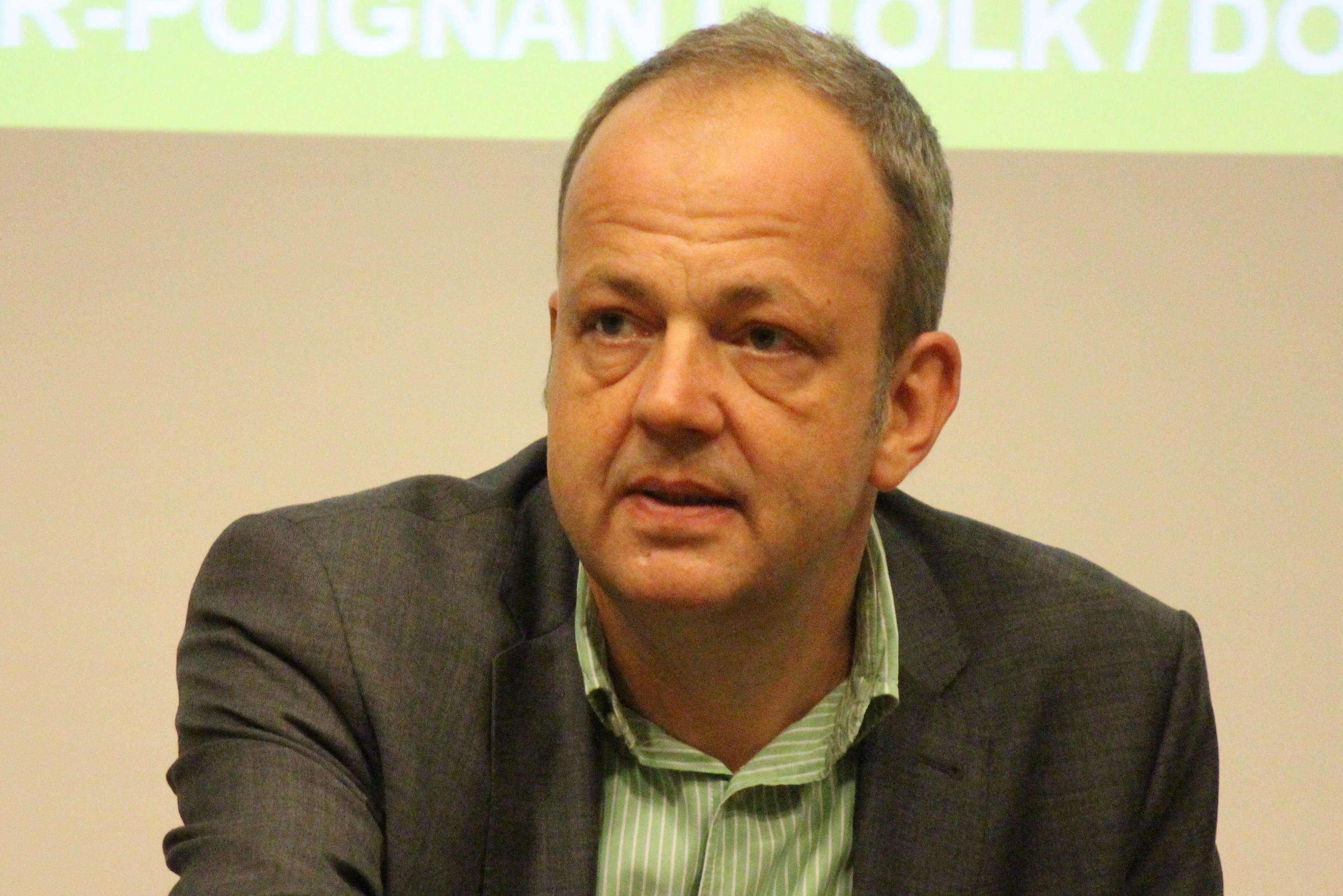 Michael Kumpfmüller, författare född 1961 i München, på besök i Stockholm. Berättade om sin roman Livets härlighet (Die Herlichkeit des Lebes) onsdagen den 2 oktober 2013 på Goethe-Institut, Bryggargatan 12A